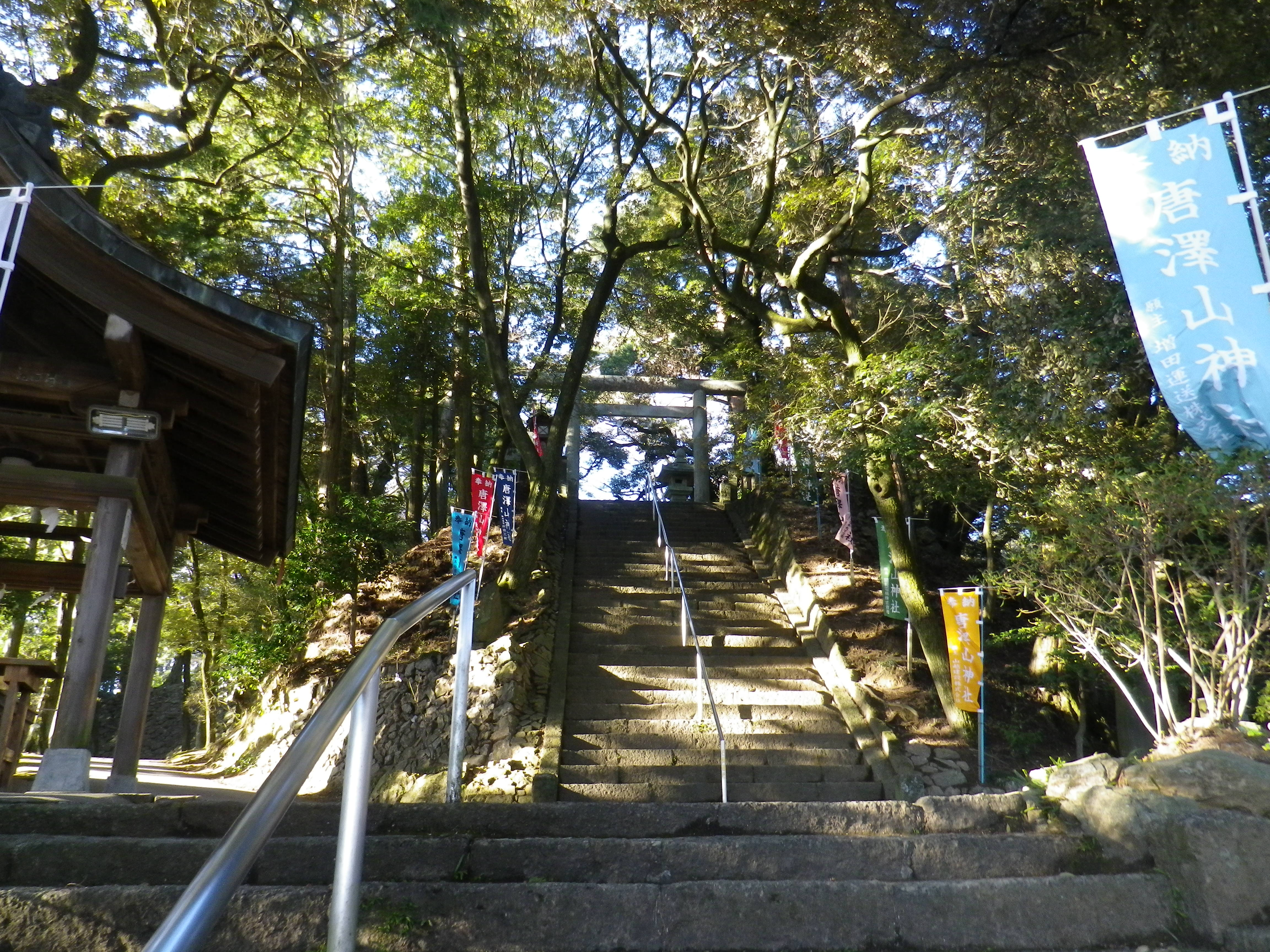 唐沢山神社（唐沢山城本丸）